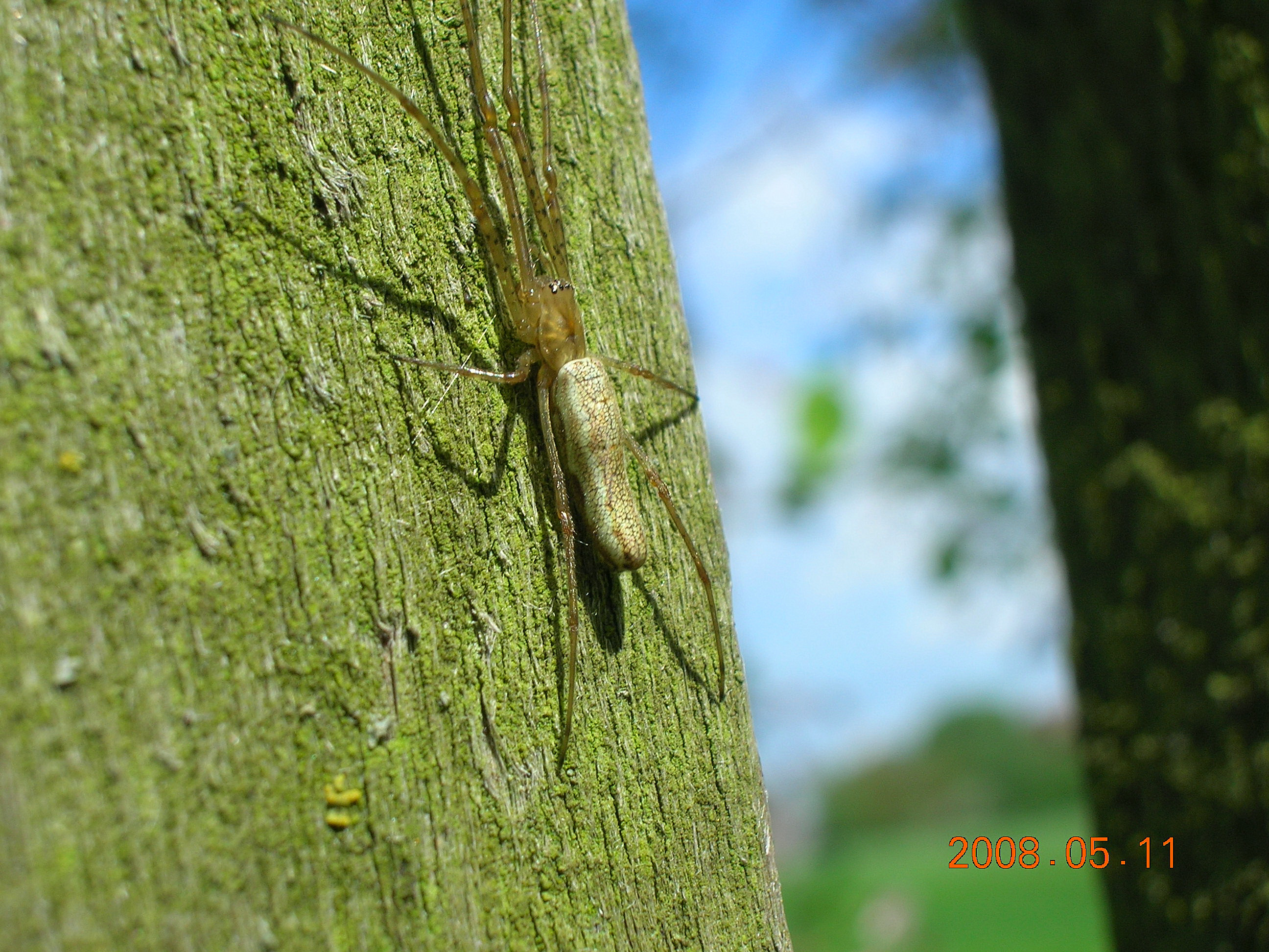 Kwadratnik długonogi (Tetragnatha montana) - samiec